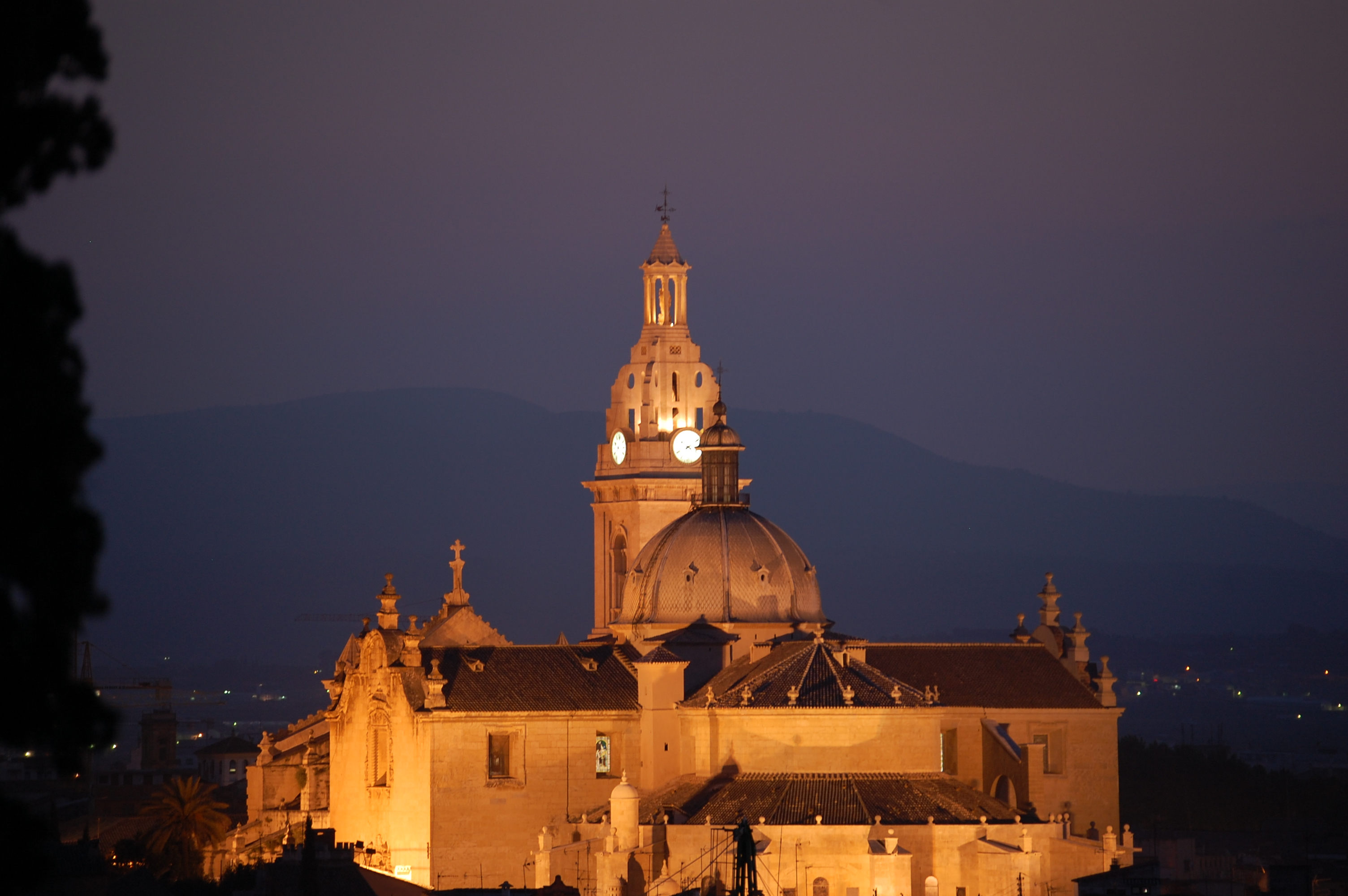 Colegiata de Xàtiva